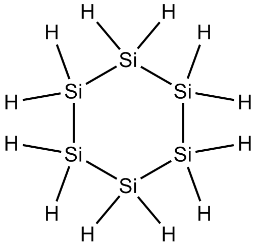 Strukturformel von Cyclohexasilan